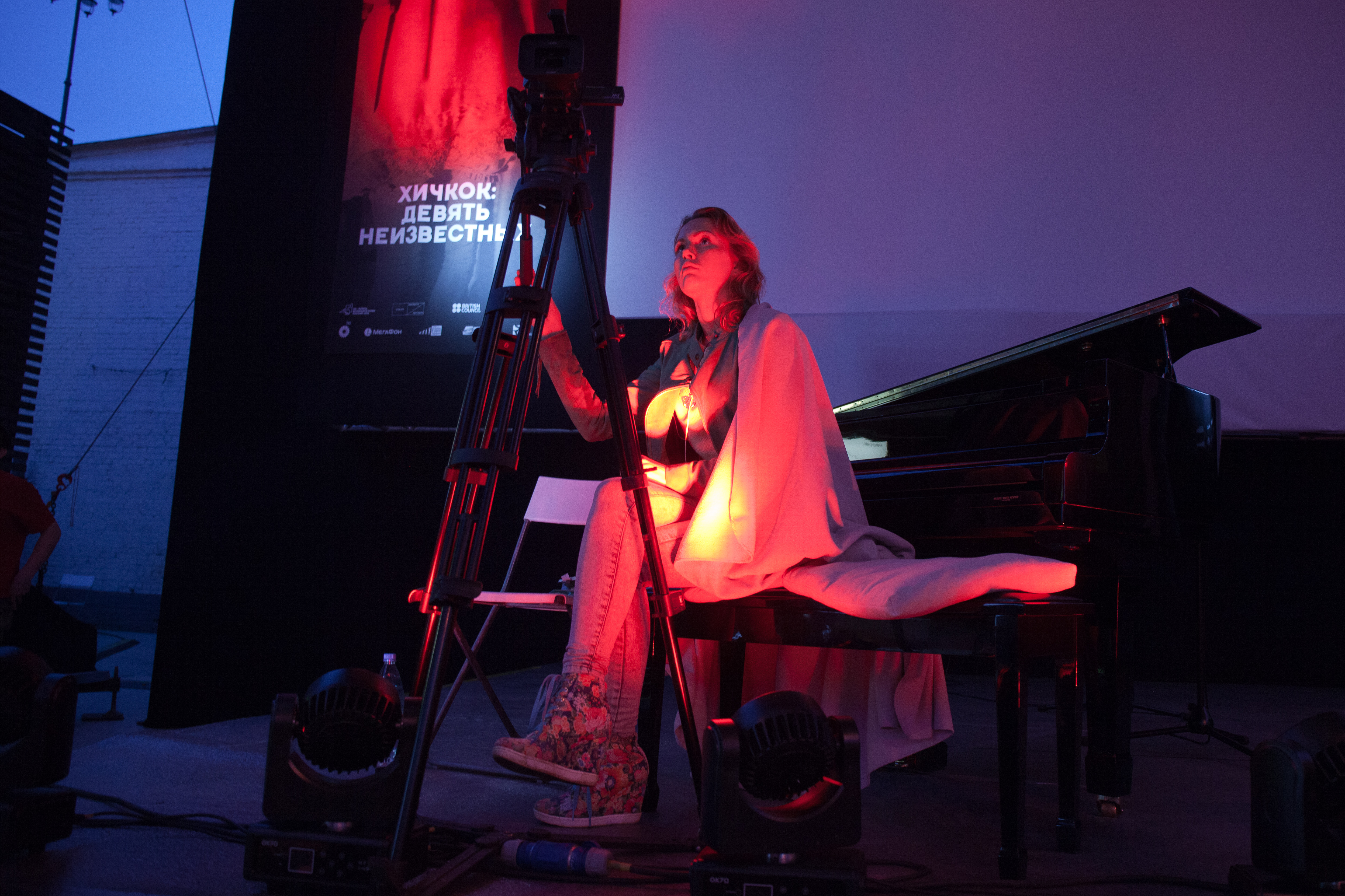 Фестиваль "Хичкок: девять неизвестных" в Москве.